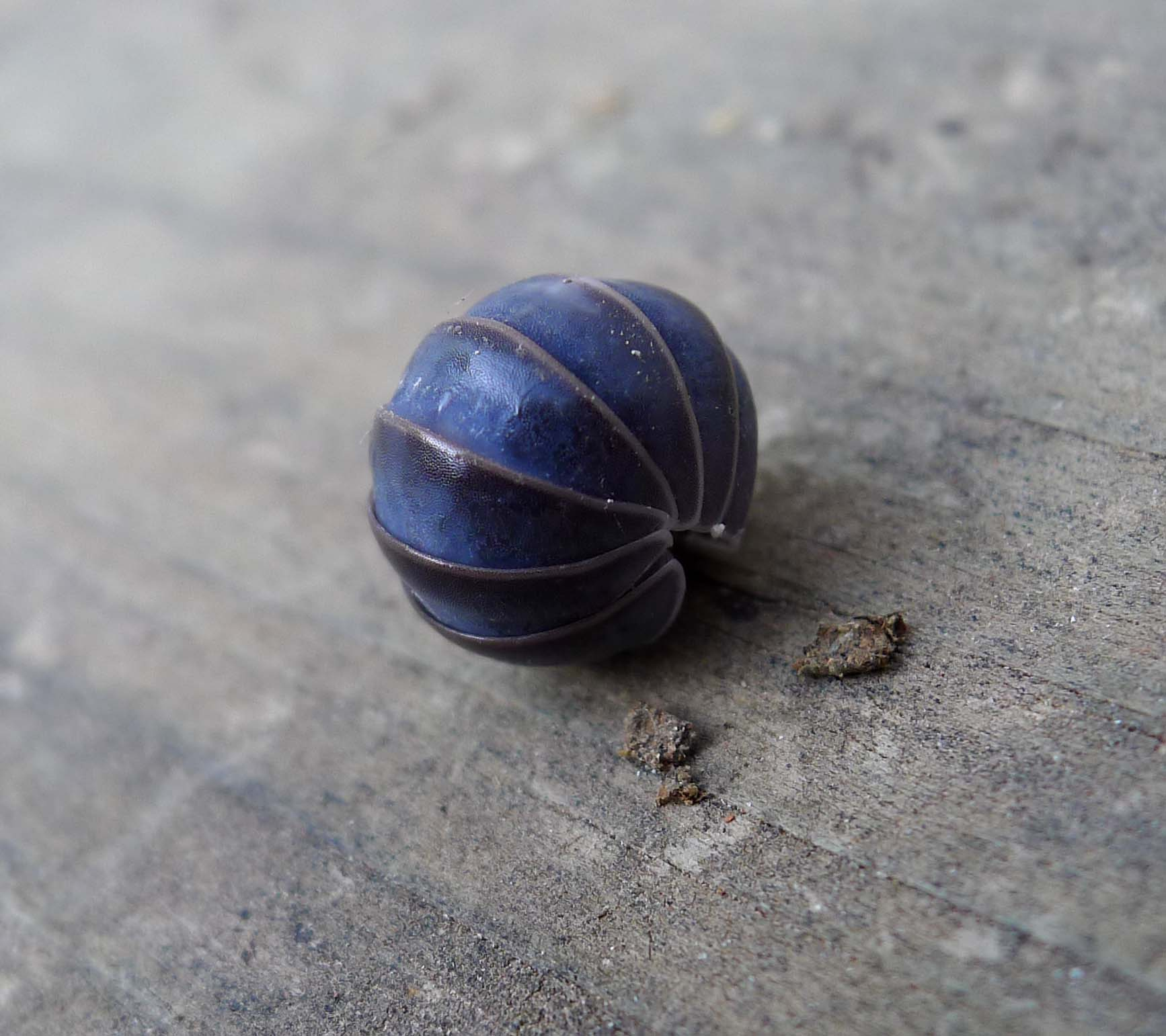 Jimena, Andalucia, Spain